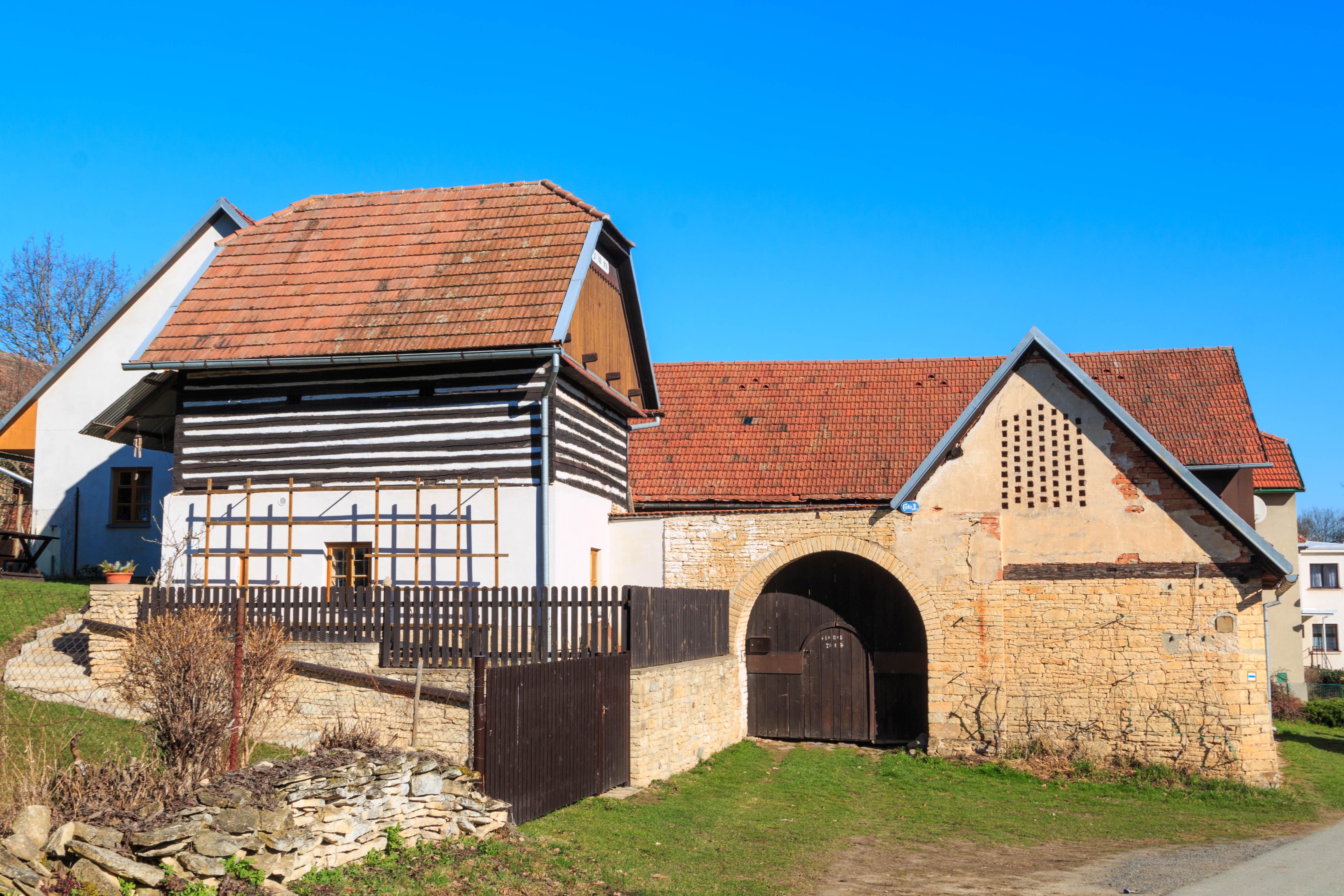 Zdislav - dům č. 1